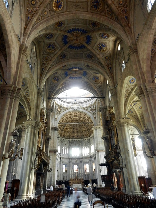 Como - Interno del Duomo